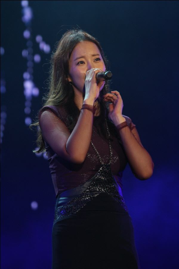 2012년 7월 19일 여수 엑스포 팝 페스티벌에서 백지영.